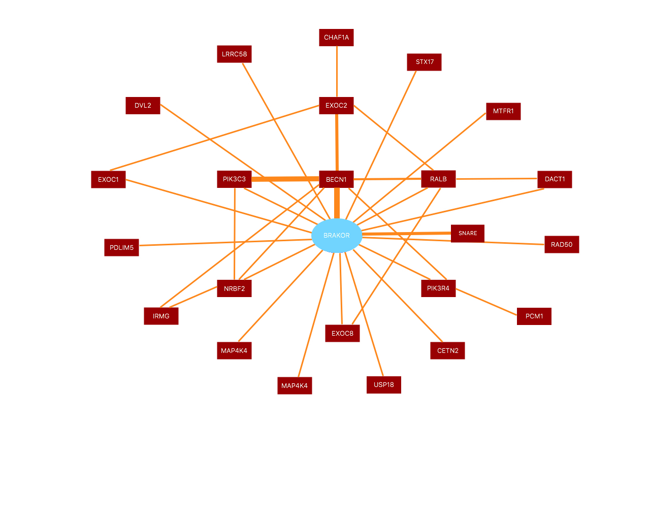 La imagen representa el conjunto de interacciones que realiza la proteína Barkor en una levadura. Se puede observar que hay interacciones más importantes (linea más gruesa) que otras, dependiendo su importancia de su importancia en la supervivencia de la especie. Las elipses son las proteinas i las lineas muestran las interacciones entre ellas.